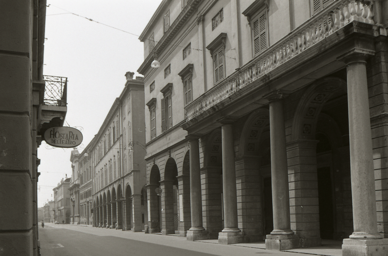 Servizio fotografico : Modena, 1973 / Paolo Monti. - Strisce: 7, Fotogrammi complessivi: 37 : Negativo b/n, gelatina bromuro d'argento/ pellicola ; 35 mm. - ((Sul portanegativi: N[I]K[MA]T FP4. - Possibile sottoserie: 1A-5A = Vista scorciata della facciata e del portale della Chiesa di San Vincenzo. - Occasione: Campagna di rilevamento del centro storico. - Fonte: Agenda di Paolo Monti: Leica 1501-3000 Controllo numerazione (1950-1978), presso Archivio Paolo Monti. - Fonte: Monografia di Orlandi, Piero: Modena: il censimento fotografico dei centri storici, Bologna, IBC (1979)